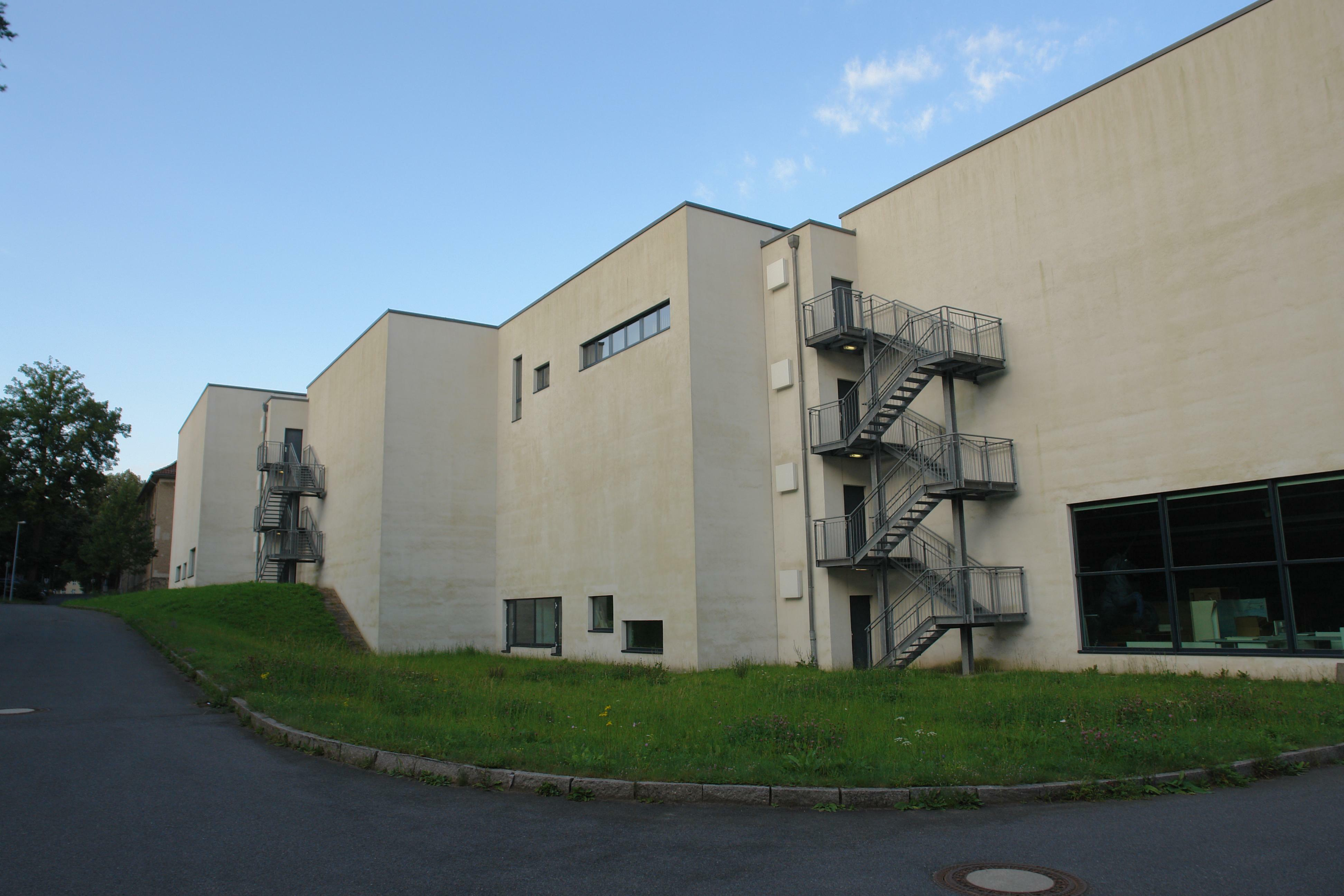 Adolf-Bernhard-Meyer-Bau mit div. Museen und Spezialbibliotheken in Klotzsche Dresden